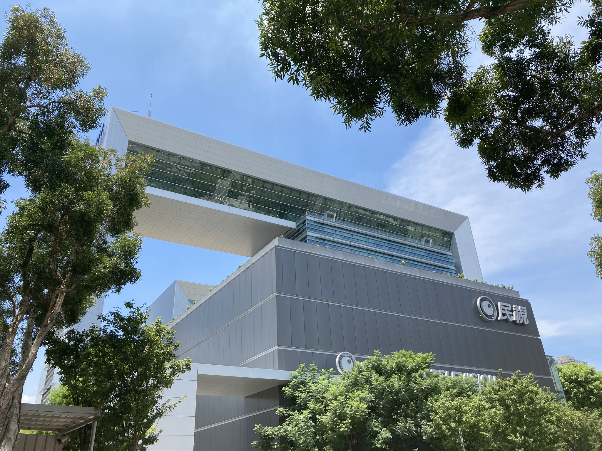 中文（台灣）: 民視電視公司總部